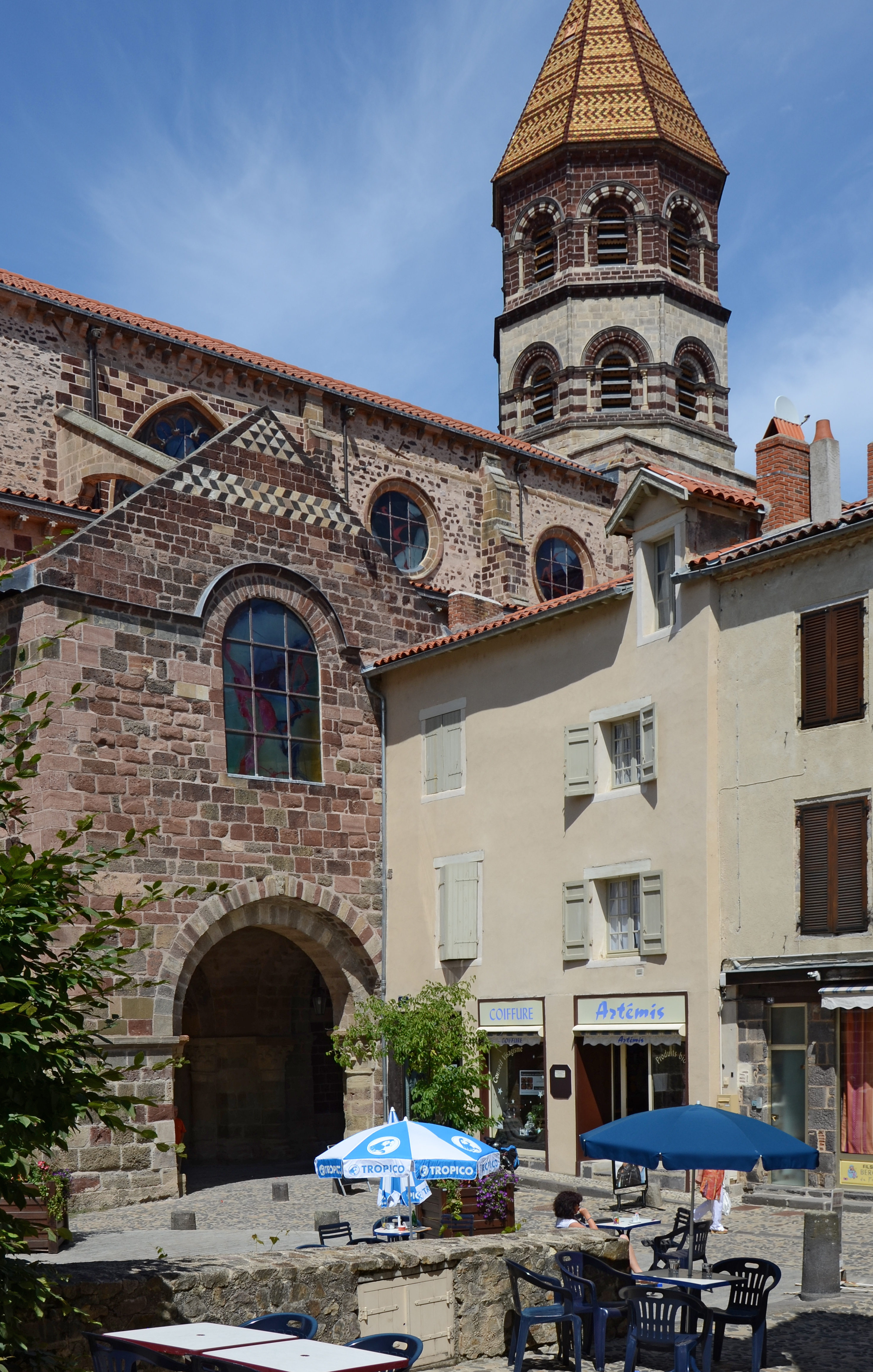 Façade sud de la basilique de Brioude, Haute-Loire, France .